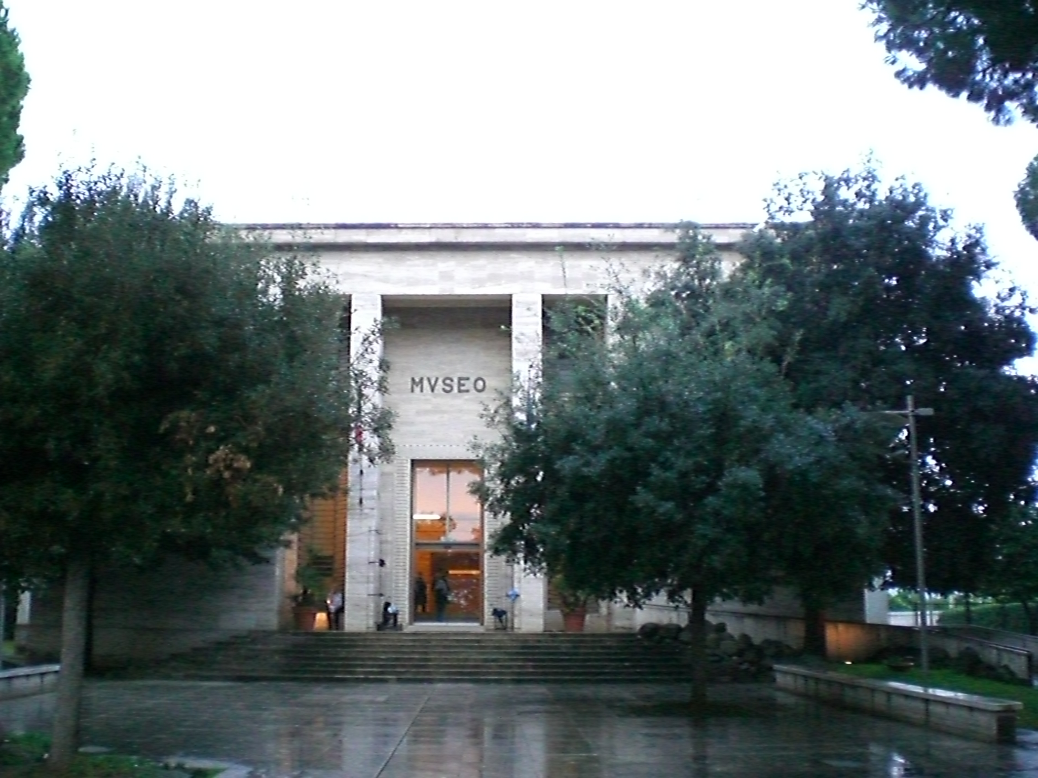 ingresso del Museo archeologico nazionale di Paestum.